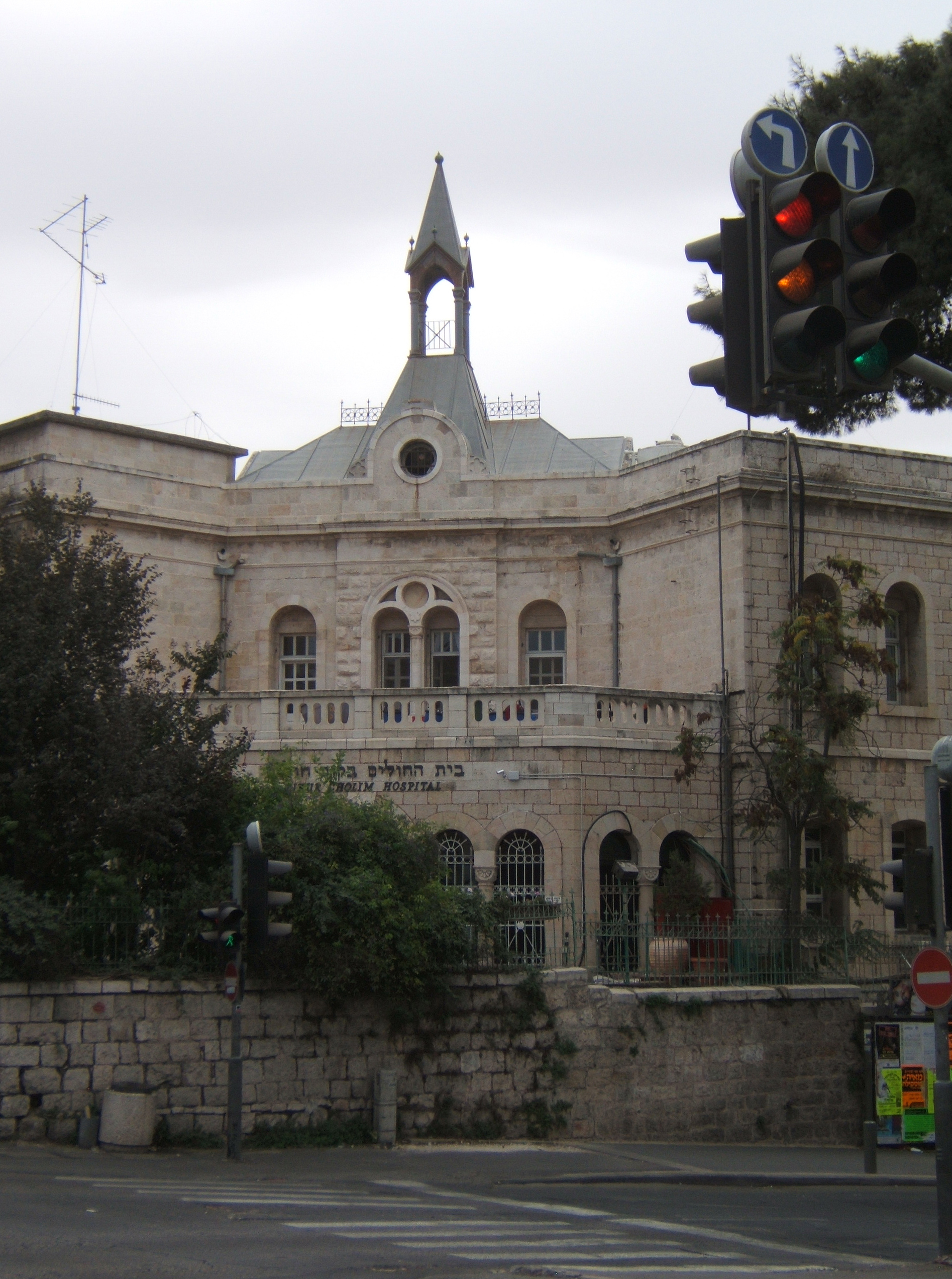 German Hospital, Jerusalem